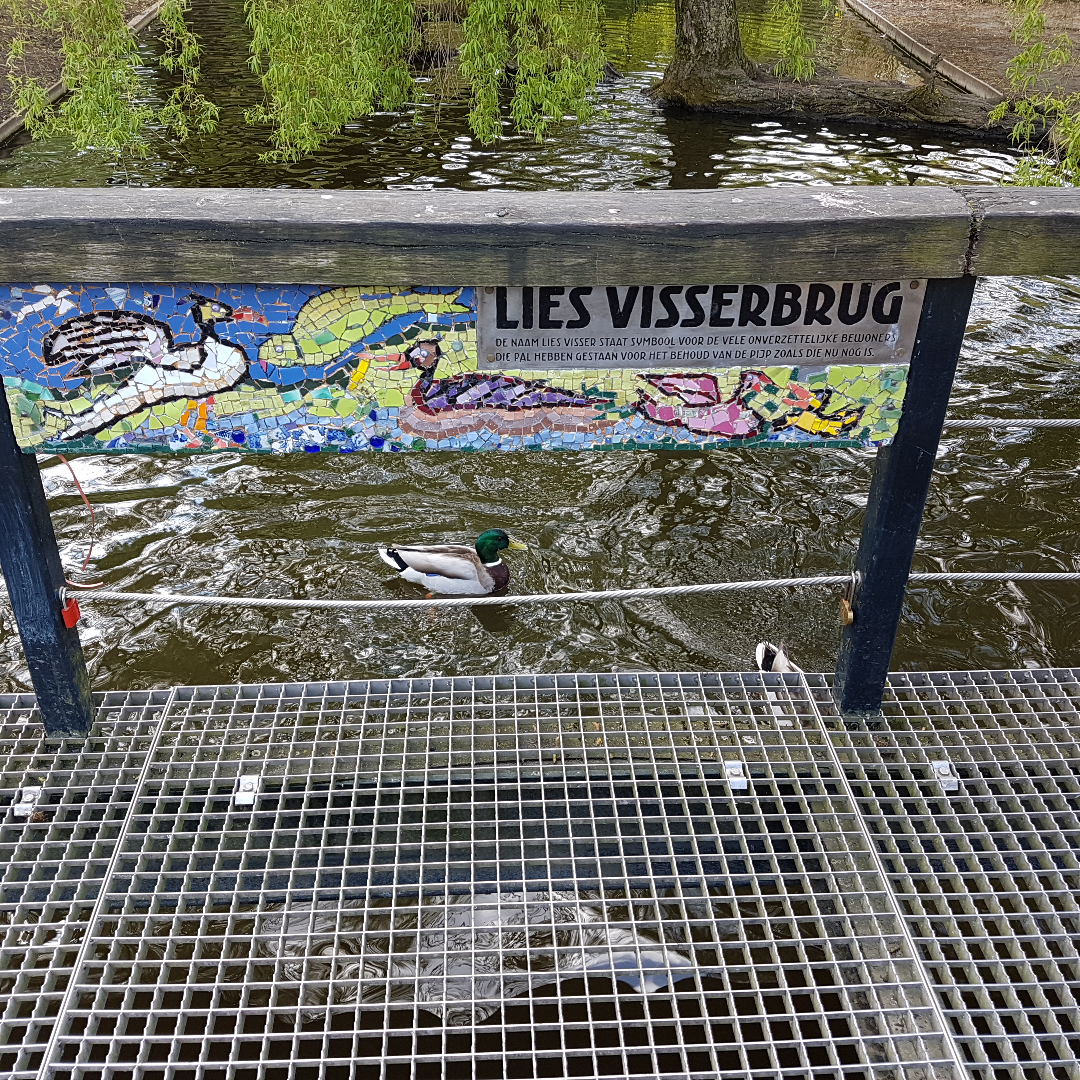 Naamplaat met mozaïek van de Lies Visserbrug in het Sarphatipark, Amsterdam